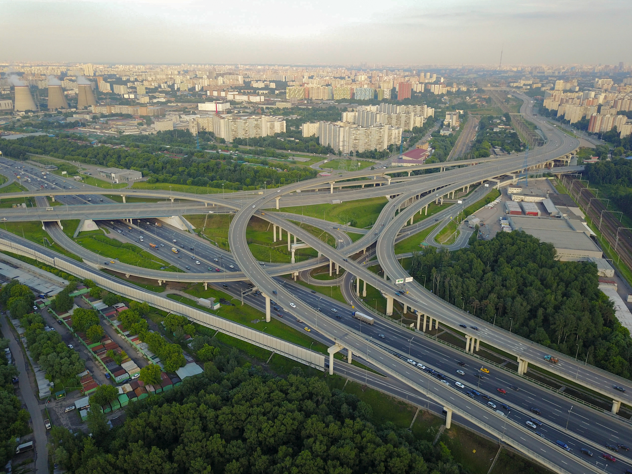 Вид с квадрокоптера. Ориентация снимка: правый нижний угол — северная дуга МКАД, западное направление; правый верхний угол — Северо-Восточная хорда, направление внутрь Москвы.